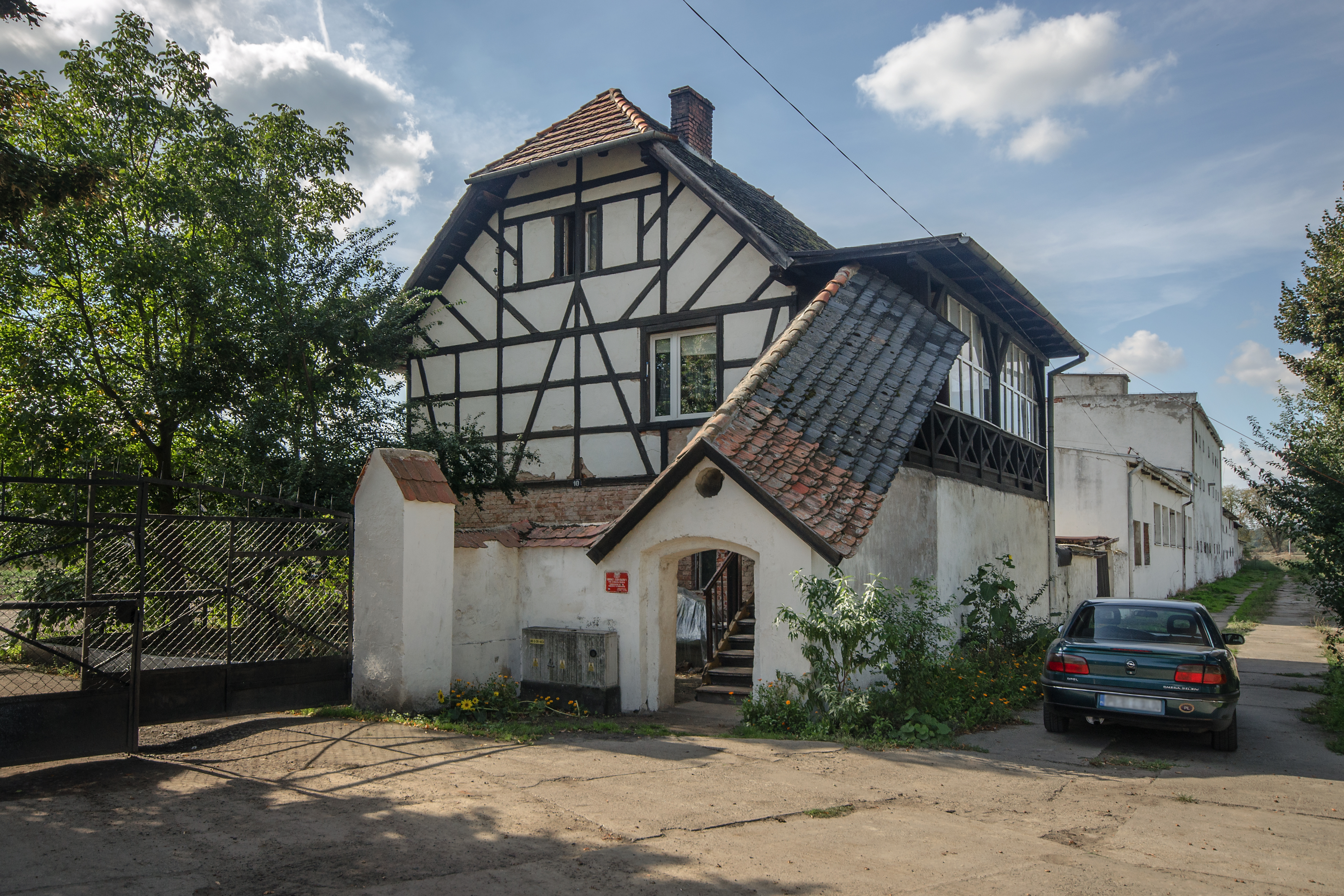 Komorzno, oficyna, kon. XVIII